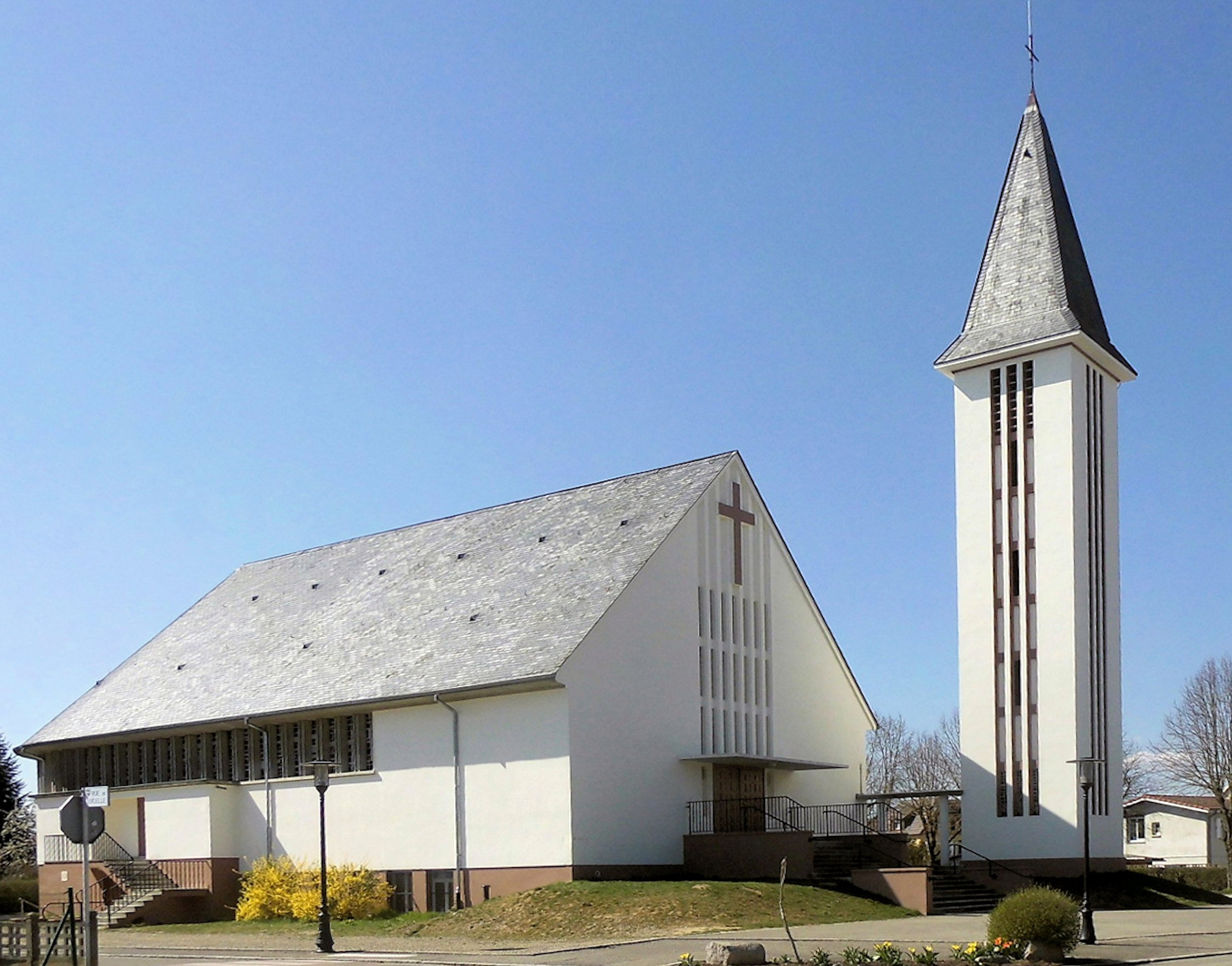 L'église Christ-Roi à Richwiller, cité Amélie II, côté est